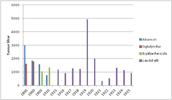 Hnignun hákarlaveiða